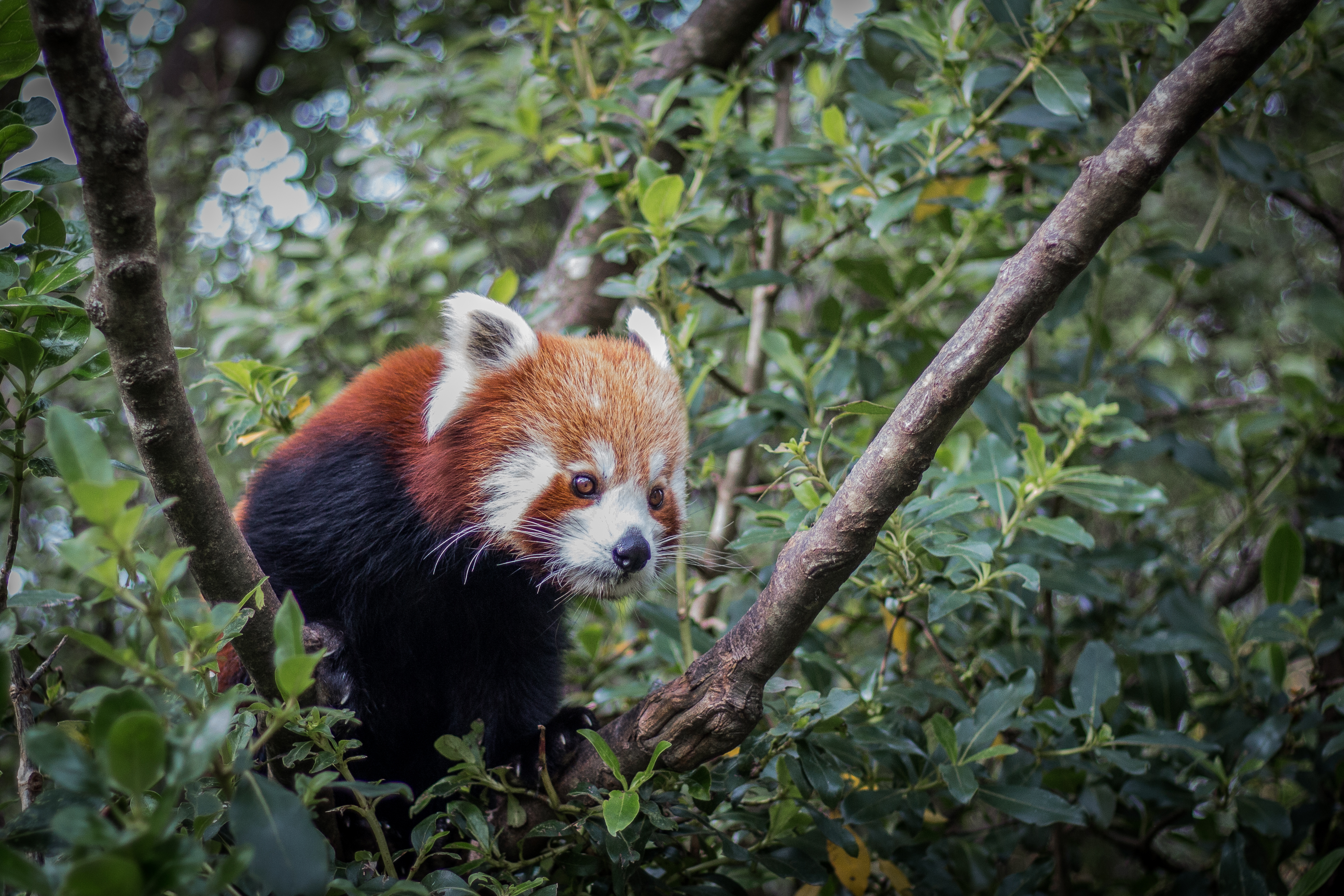 Panda roux aux aguets - Zoo de Wellington, NZ.